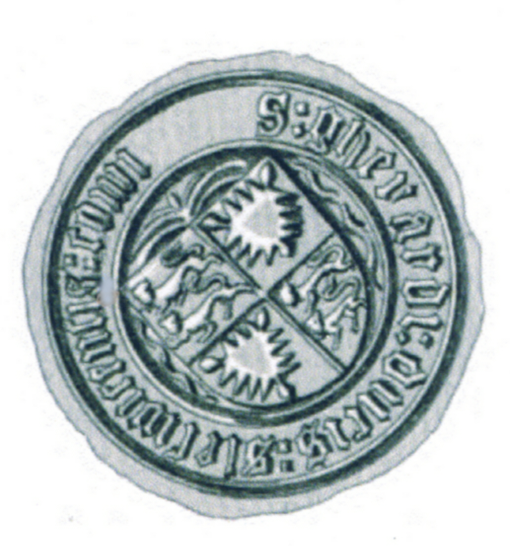 Siegel des Gerhard VII. (* 1404; † 24. Juli 1433 in Emmerich am Rhein), Herzog von Schleswig und (als Gerhard III.) Graf von Holstein. Er war der jüngste Sohn von Gerhard VI. und dessen Frau Elisabeth von Braunschweig. Das Siegel stammt aus der Zeit um 1422.